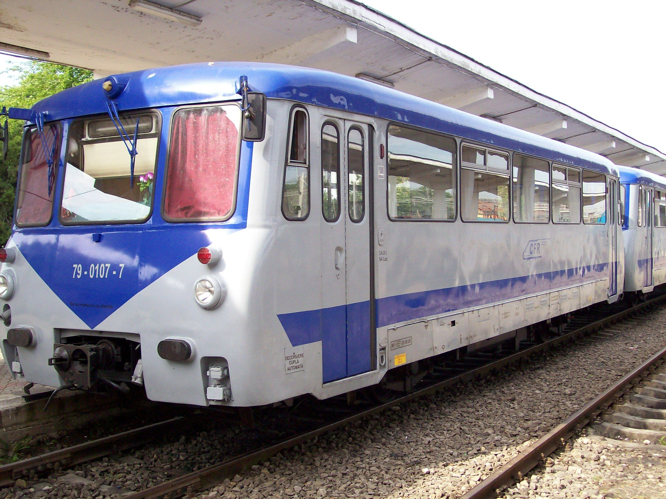 Automotor CFR clasa 79